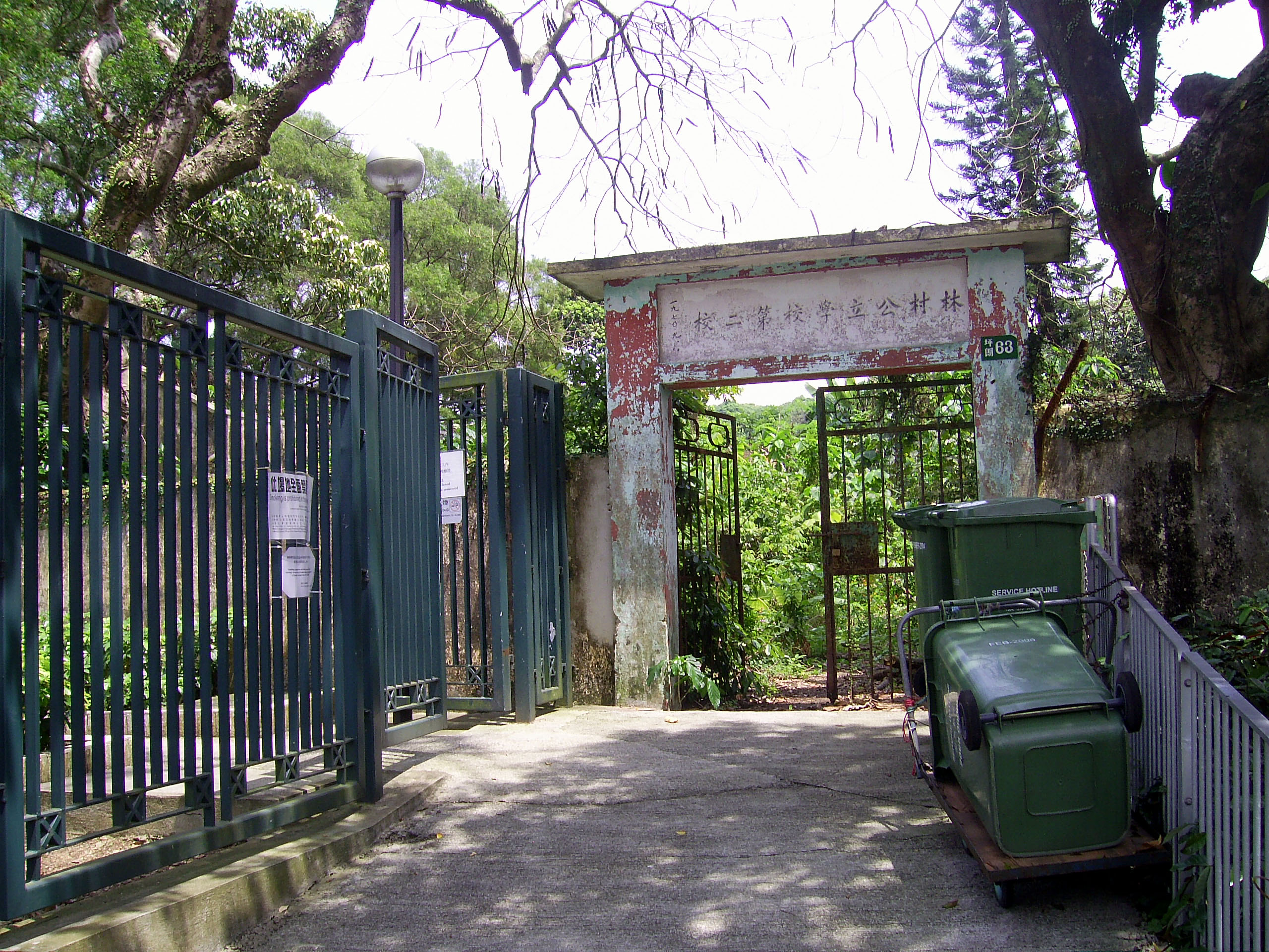 中文（香港）: 林村公立學校第二校